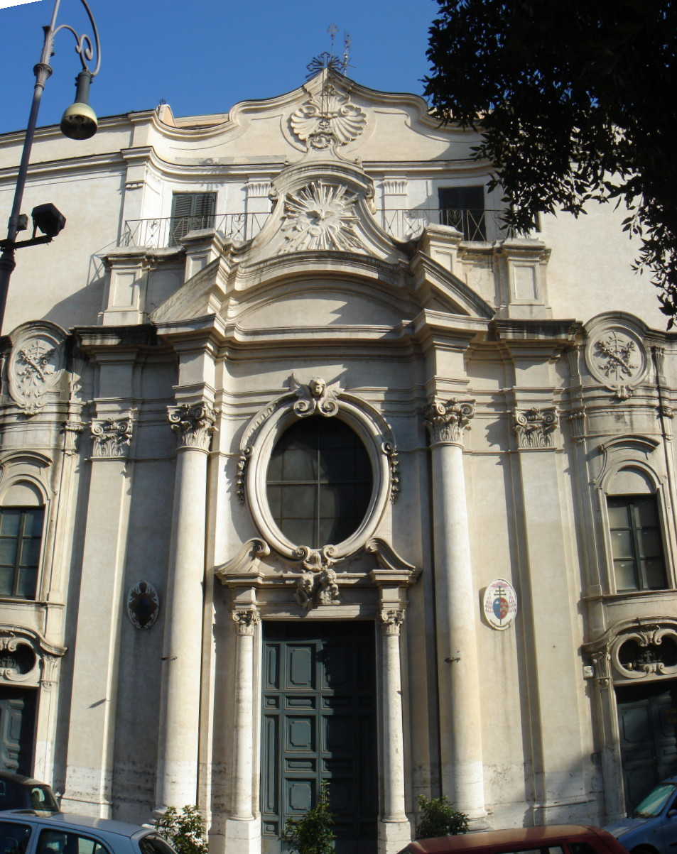 Roma, Borgo, Lungotevere Vaticano: Oratorio dell'Annunziata della Confraternita di San Michele Arcangelo